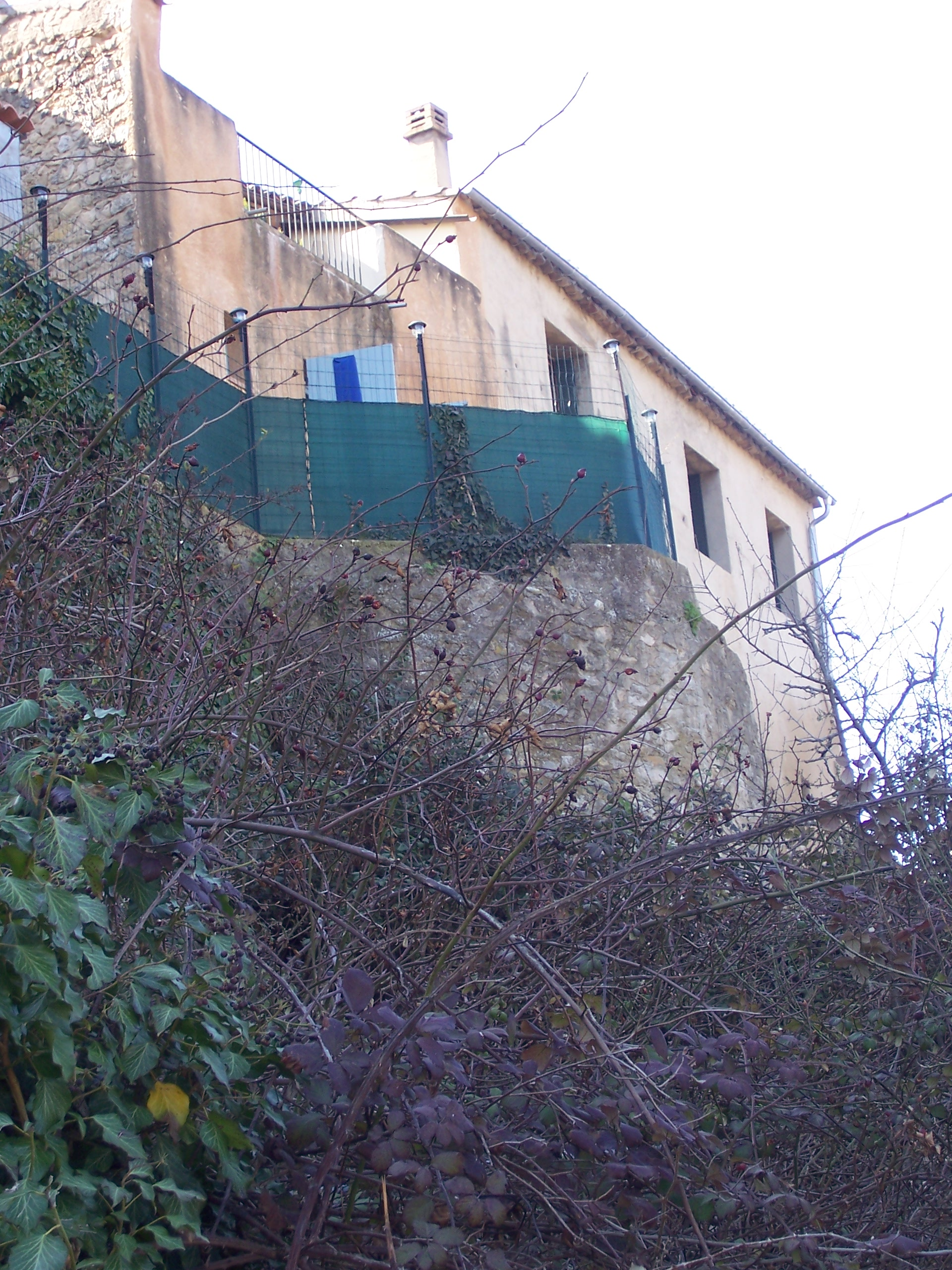 Tout Nord M vue de l'est